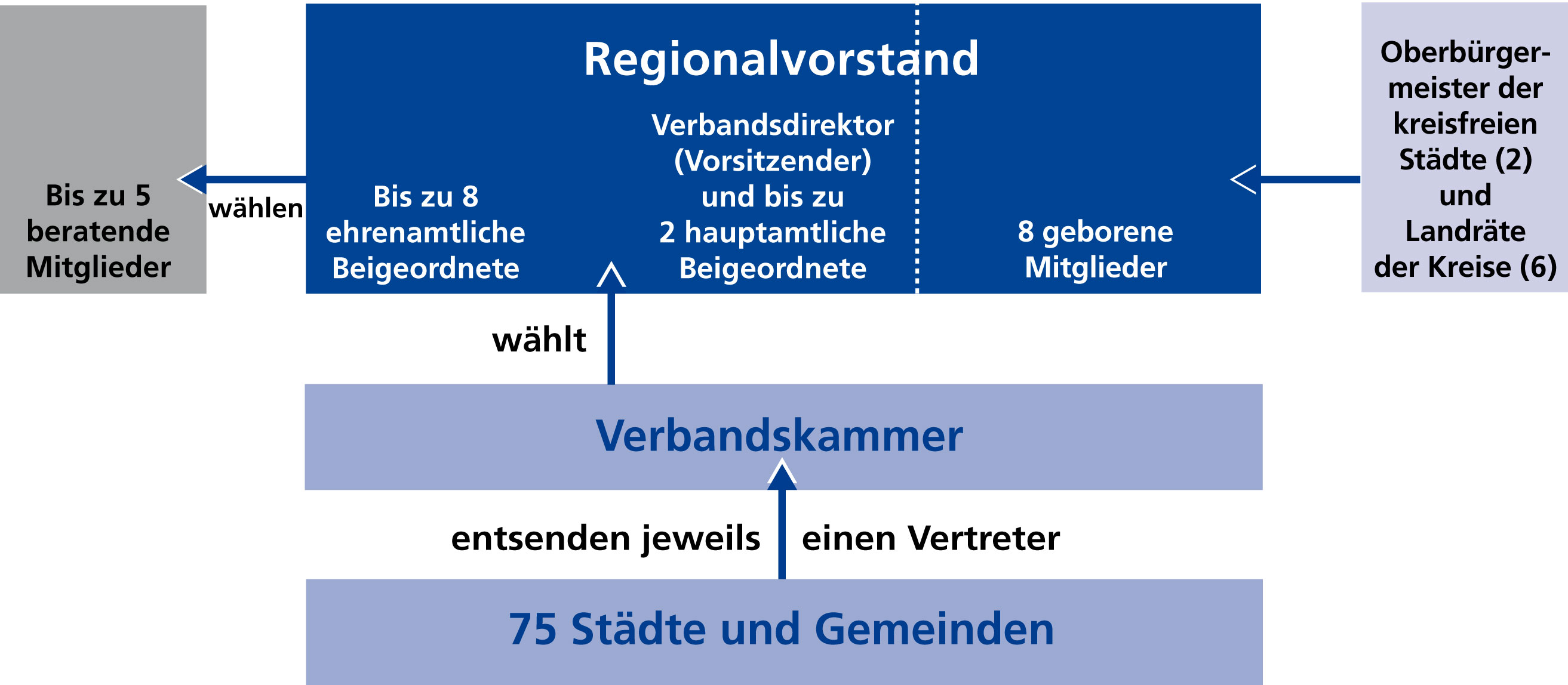 Jede Mitgliedskommune entsendet einen Delegierten in die Verbandskammer, die wiederum den Regionalvorstand wählt.